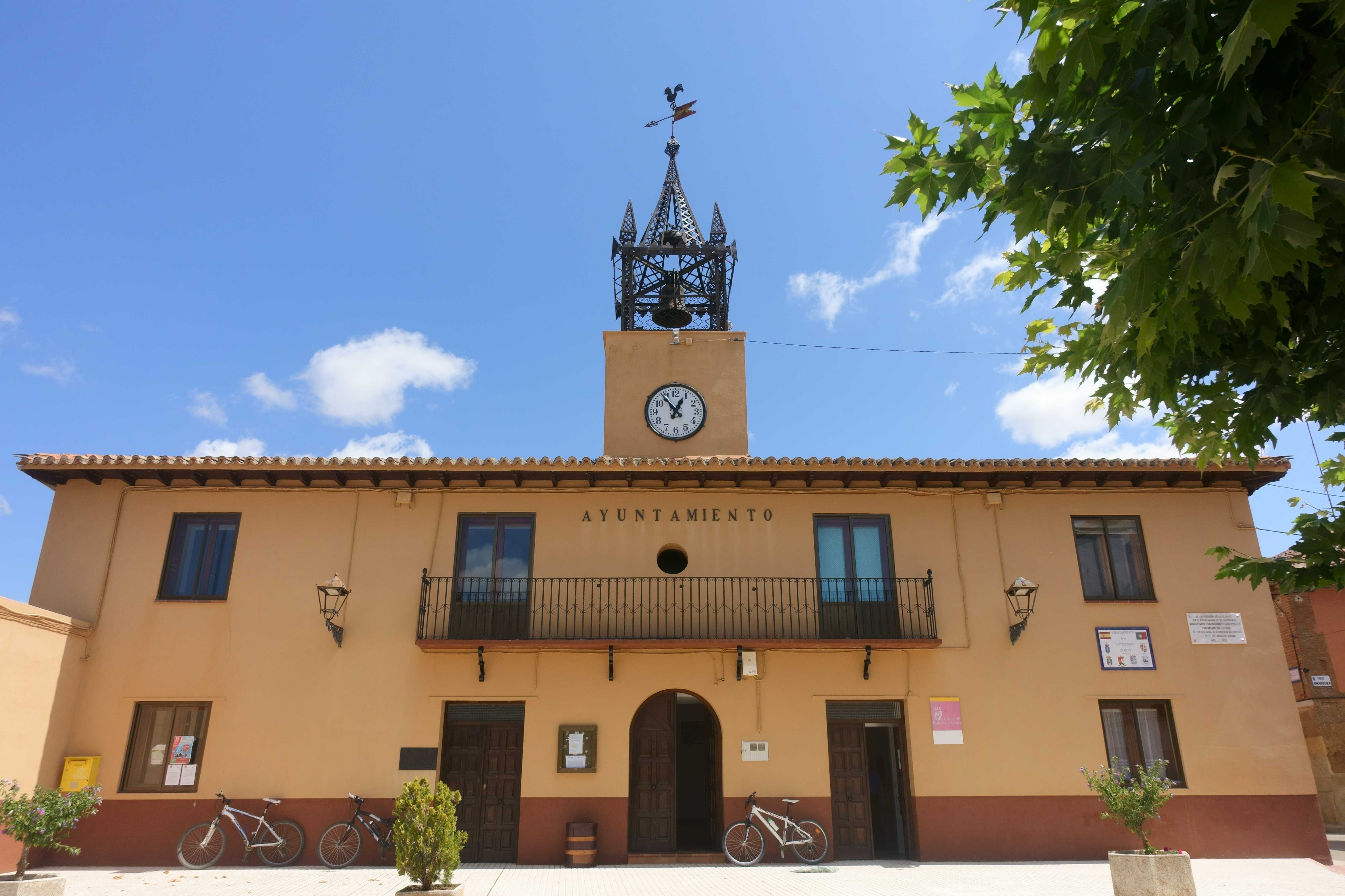 Casa consistorial de Castroverde de Campos (Zamora, España).